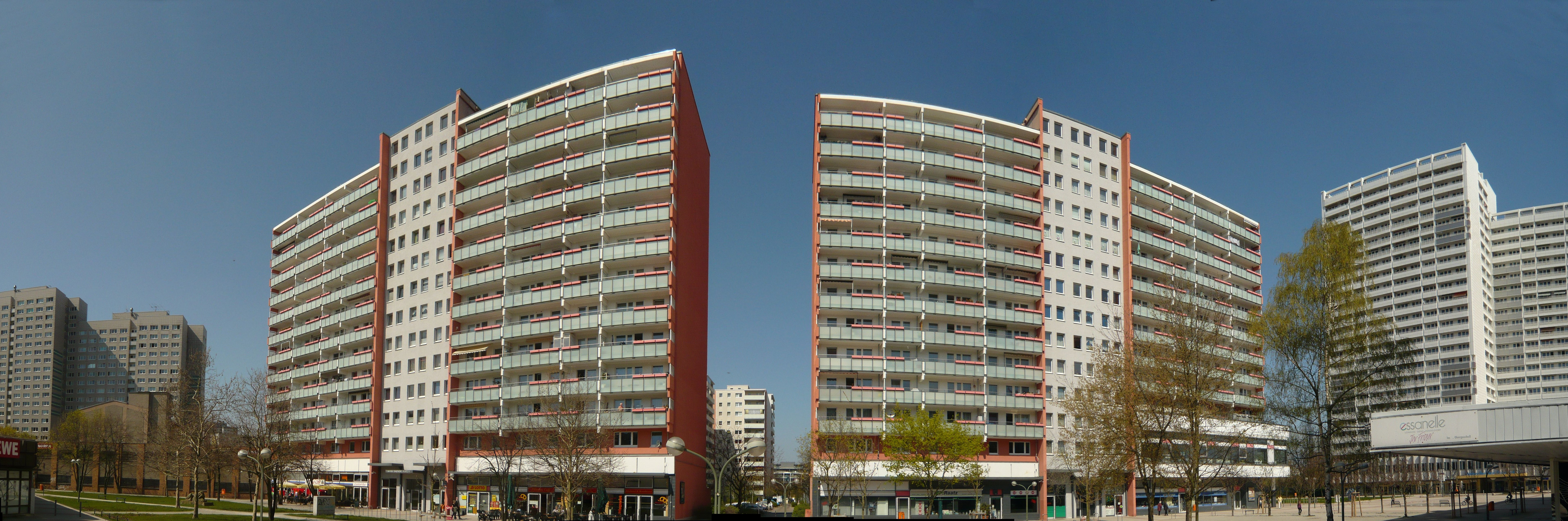 Anton-Saefkow-Platz: Panorama, Blick von Süd nach Nord